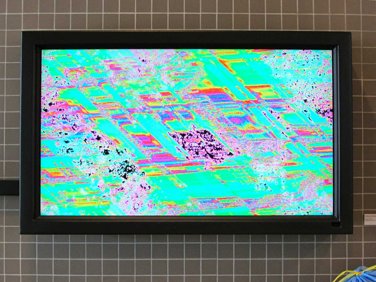 E-volver door Erwin Driessens en Maria Verstappen - Onderzoeksgebouw nabij het LUMC te Leiden